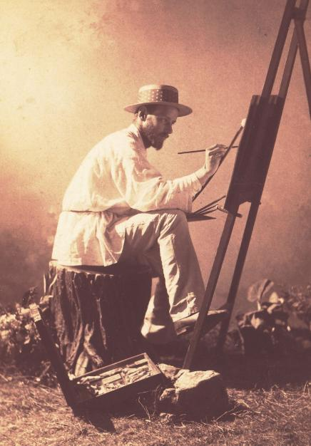 Эмиль Оскарович Визель рисует